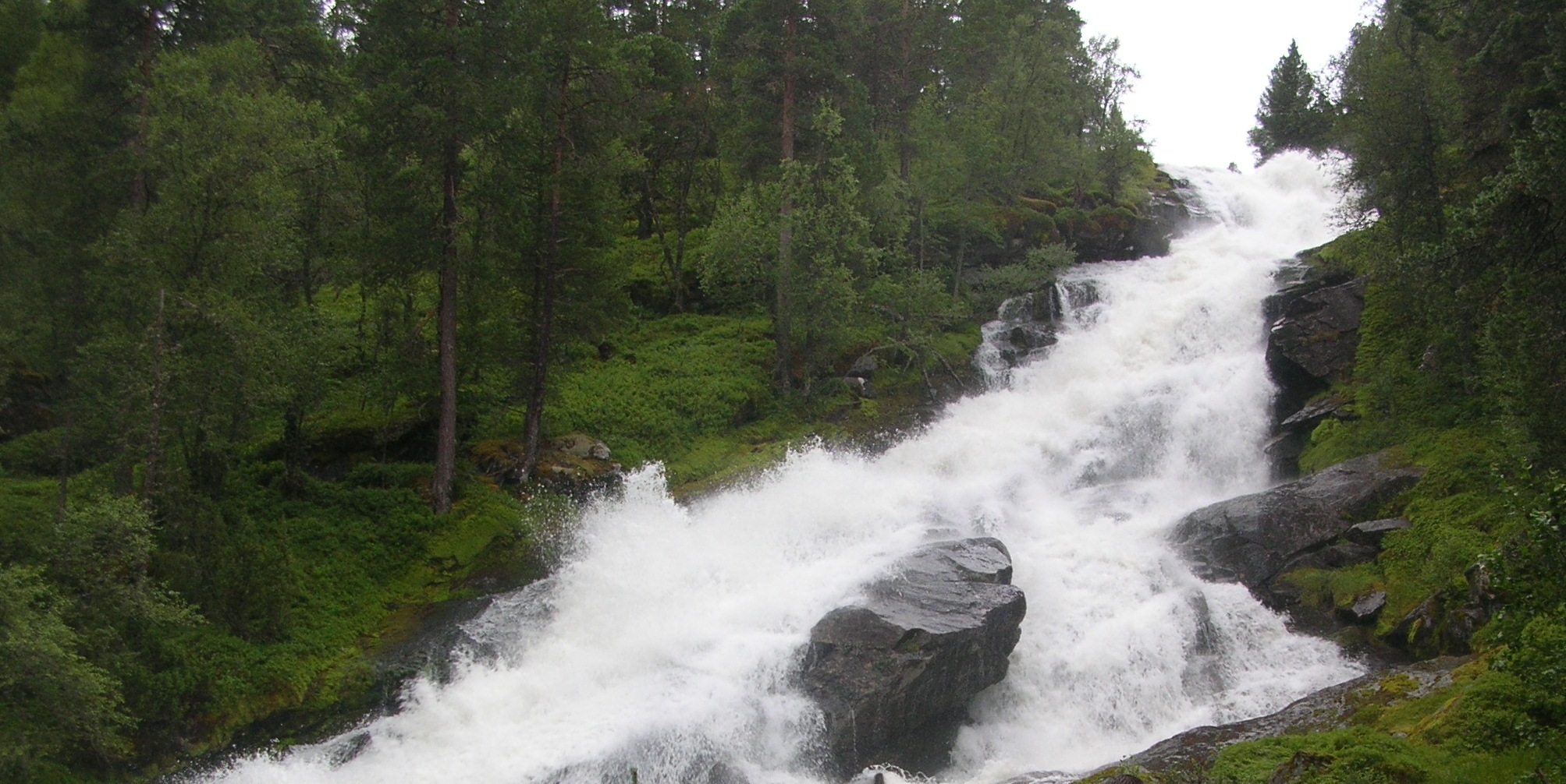 Brekkefossen waterfall, Oppedal in Viksdalen village, Gaular municipality, Sogn og Fjordane county, Norway